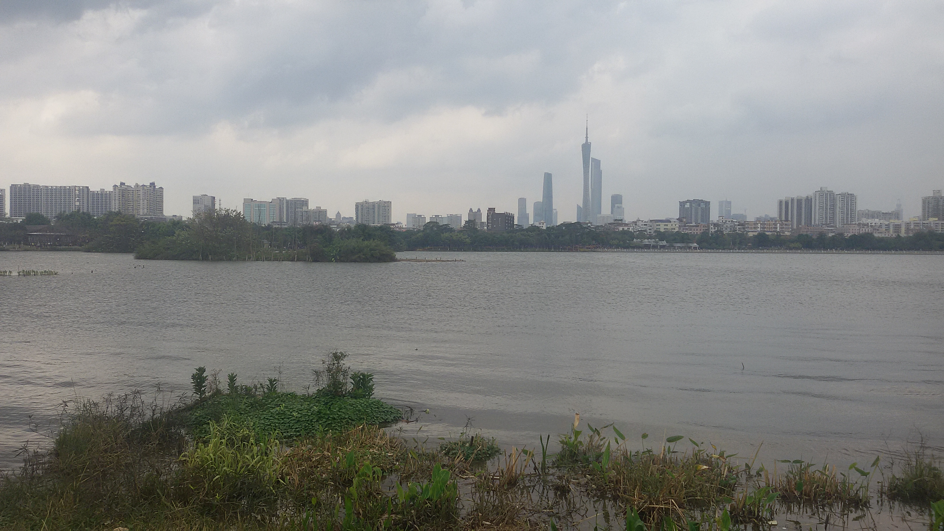 粵語: 海珠湖公園